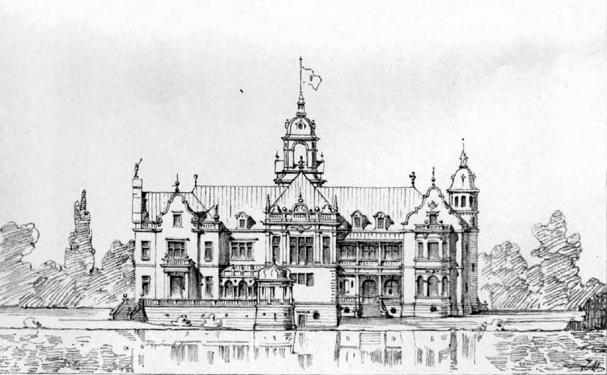 Палац у Сколишині, Польща. Проект Зигмунта Генделя (1862—1929).